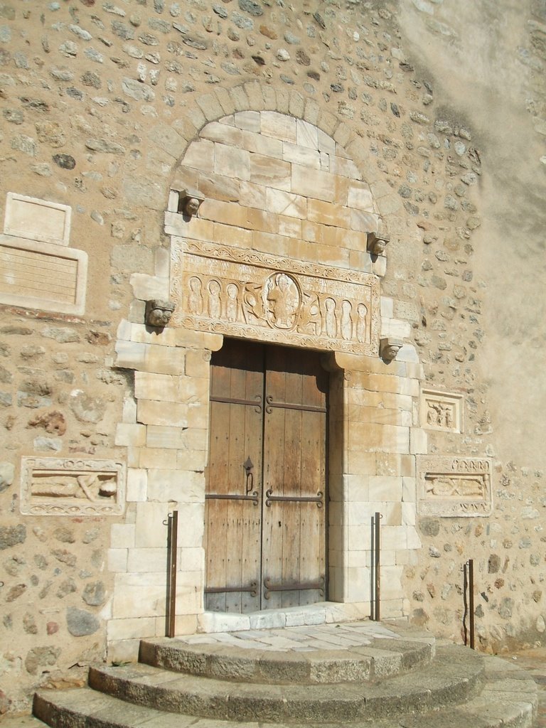 Abbaye de Saint-Génis-des-Fontaines (Pyrénées-Orientales, Languedoc-Roussillon, France) : façade de l'église abbatiale Saint-Génis (Xème - XIIème siècles)